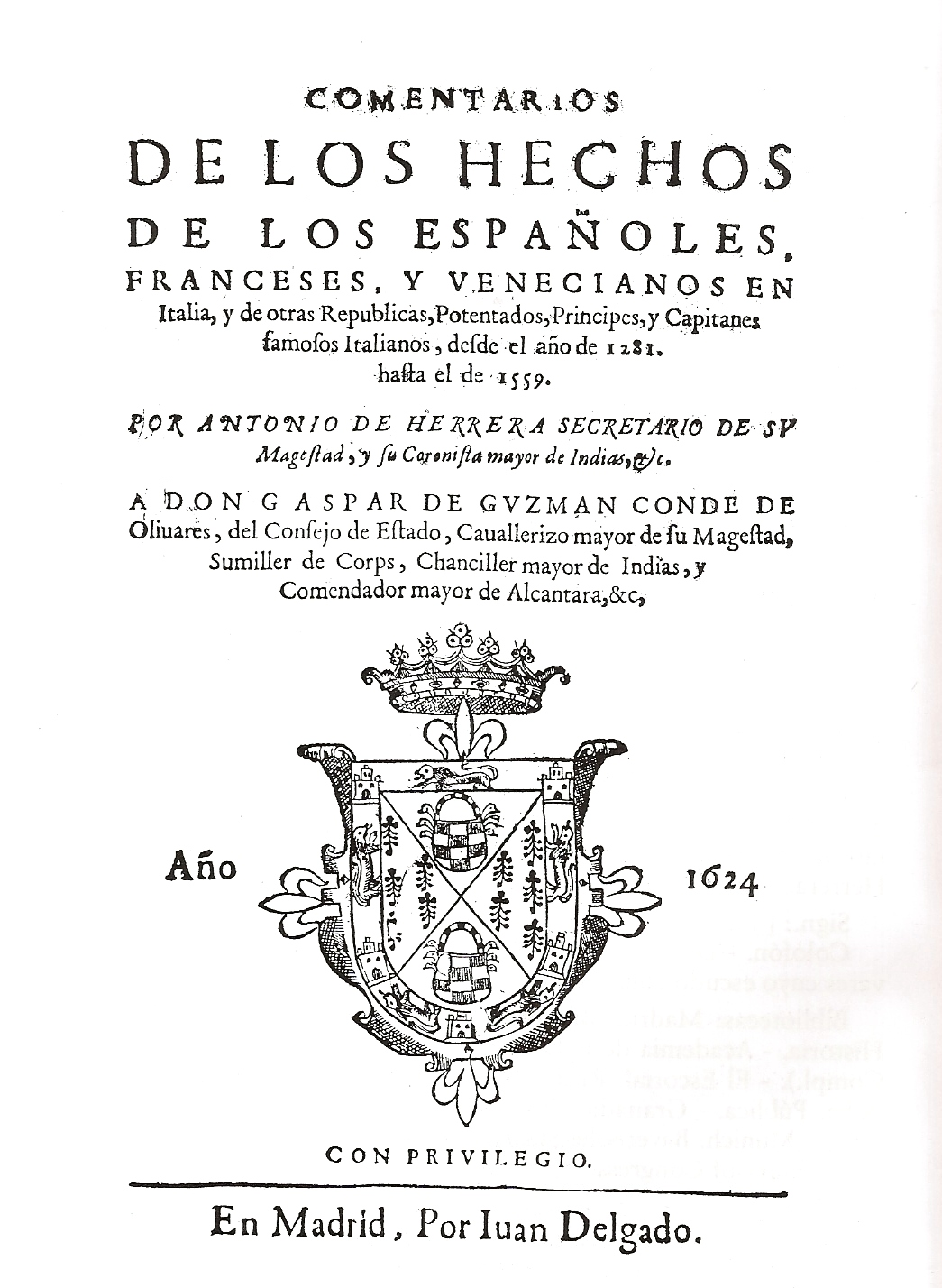 Portada de la obra "Comentarios de los hechos de los españoles, franceses y venecianos en Italia y de otras Repúblicas..." escrita por Antonio de Herrera y Tordesillas y publicada en 1624.